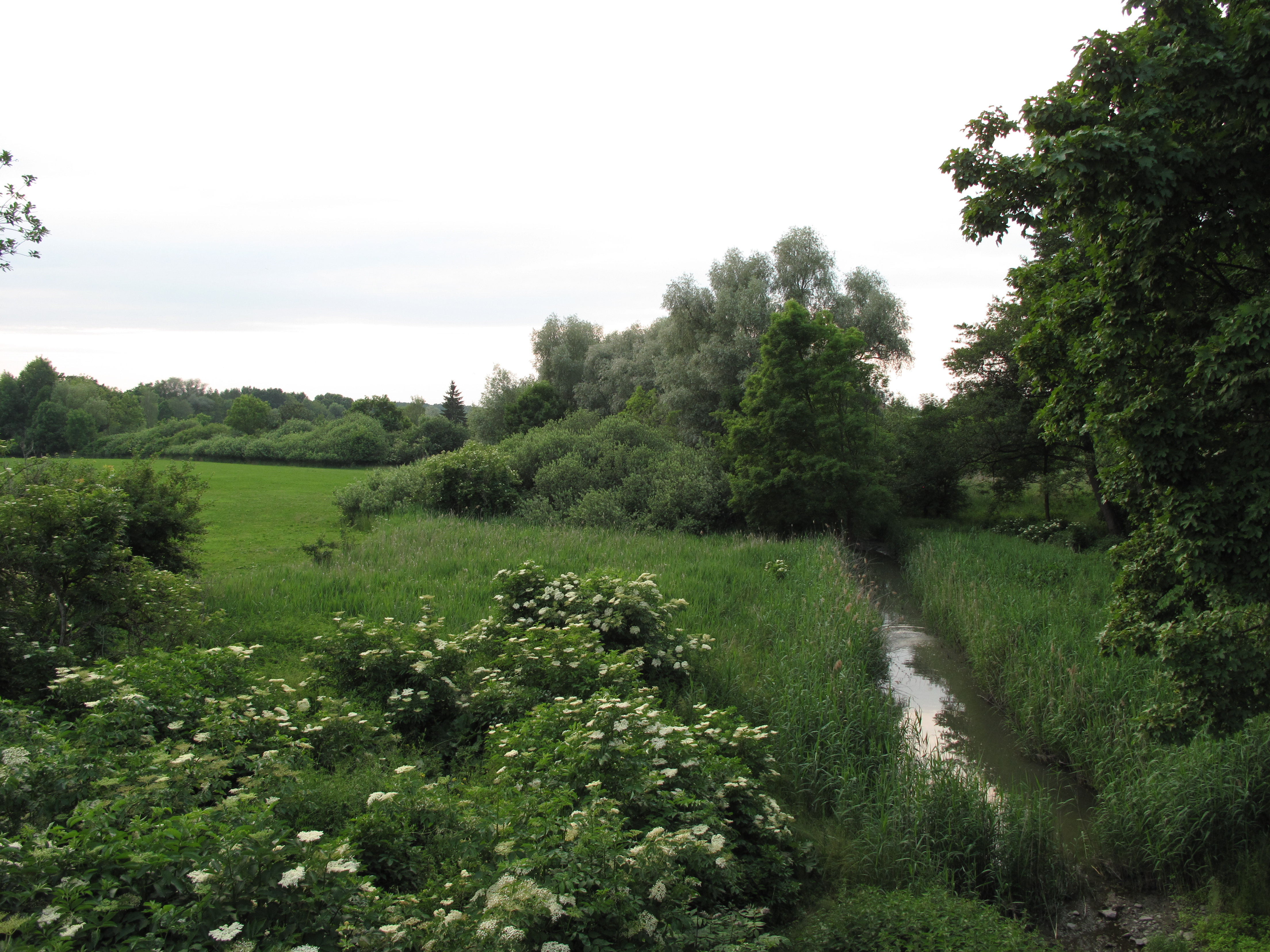 Záhornický potok v Nouzově. Okres Nymburk, Česká republika.